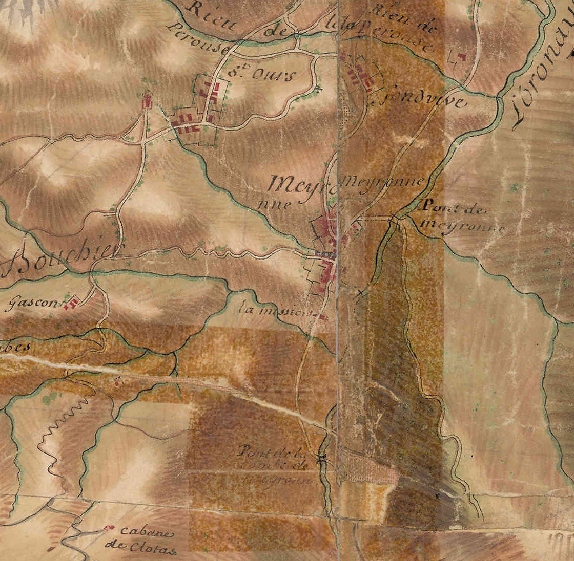 carte de Bourcet numérisé Paris, Nicolas-Alexandre et Olivier-Joseph, Extrait réduc JPG 30% Antoine-H